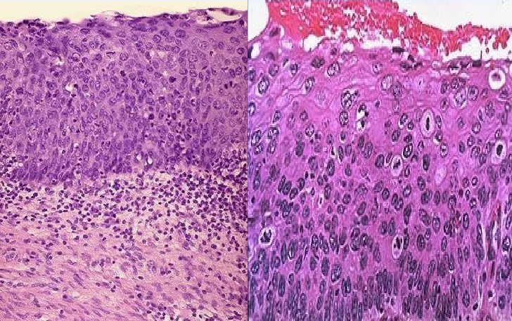 Umetoki lepoko minbiziaren ikuspegi histologikoa (eskuinaldean)